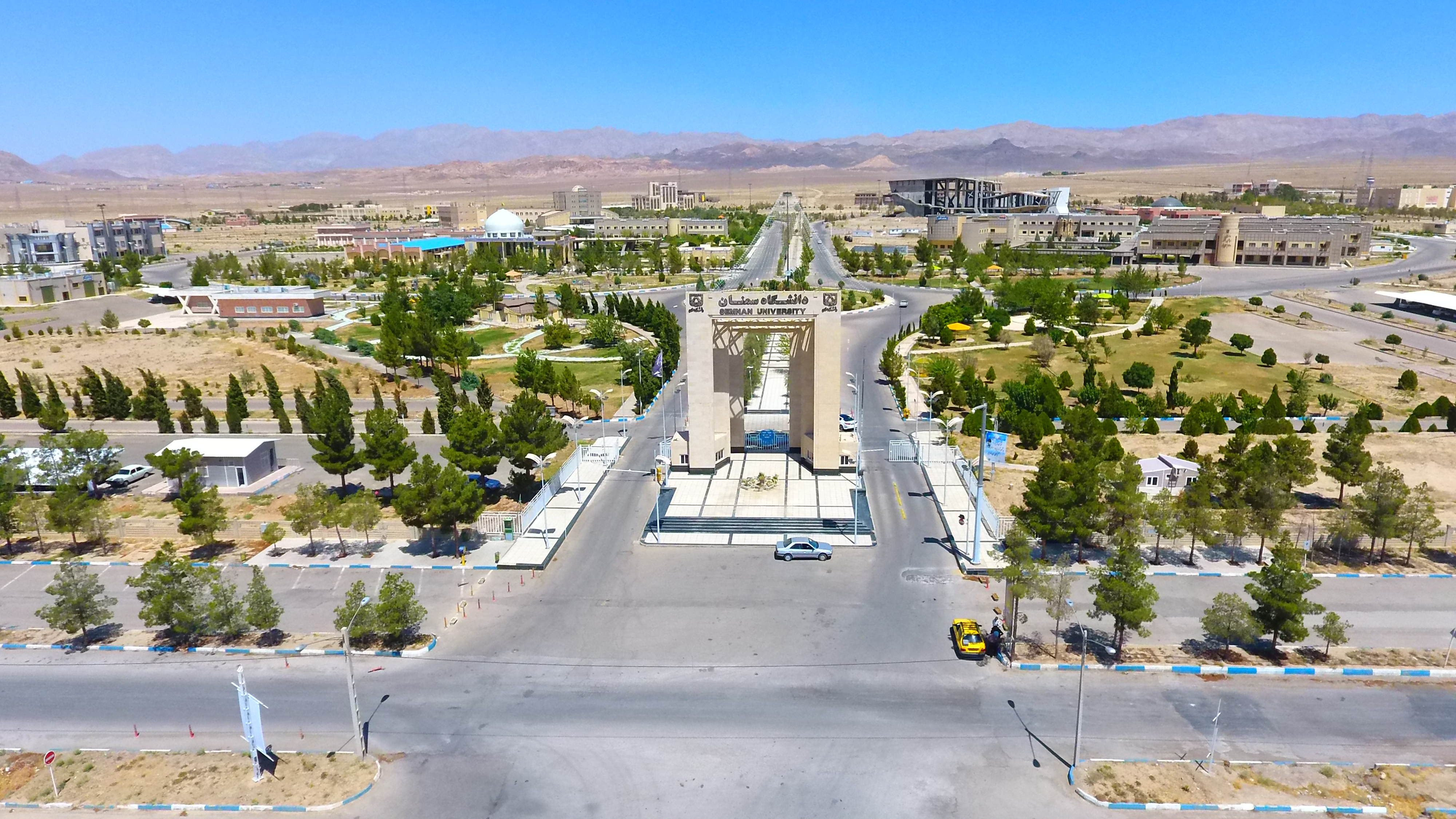 نمای هوایی دانشگاه سمنان